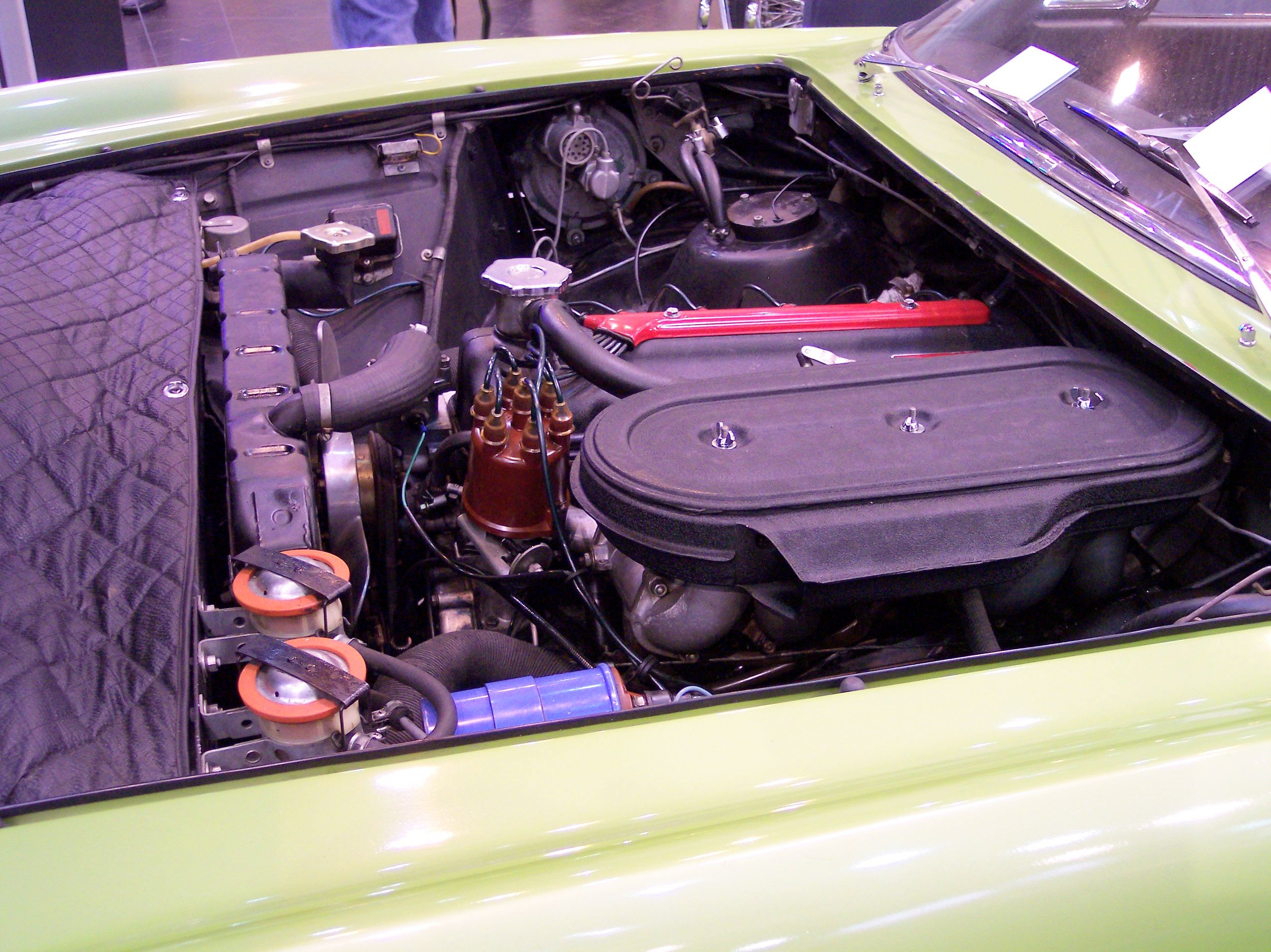 Ghia-Fiat G230S 1963 engine